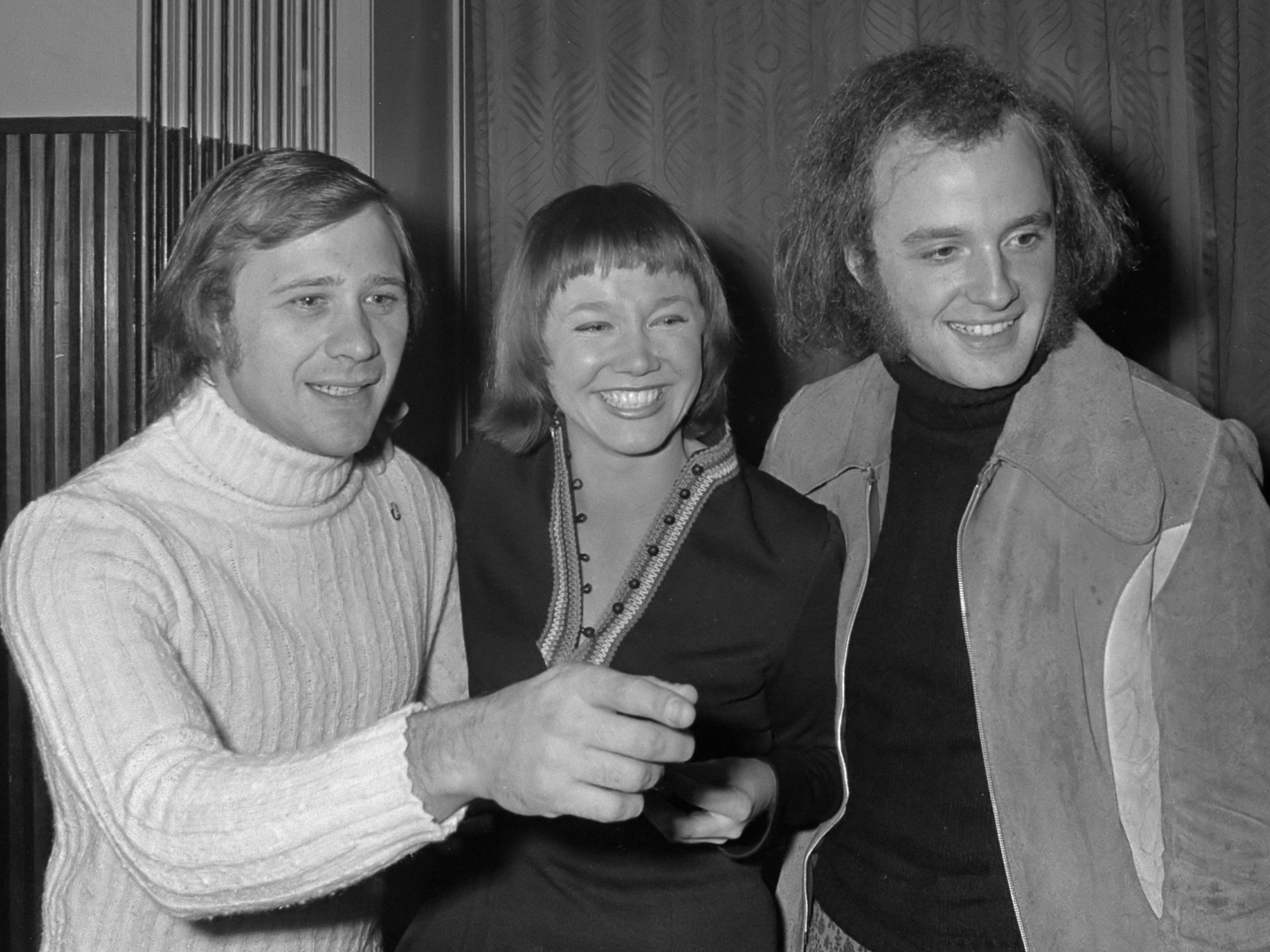 St. Conamus reikt zilveren en gouden harpen uit, Amsterdam, v.l.n.r. Frits Lambrechts , Loeki Knol , Thijs van Leer 15 november 1971